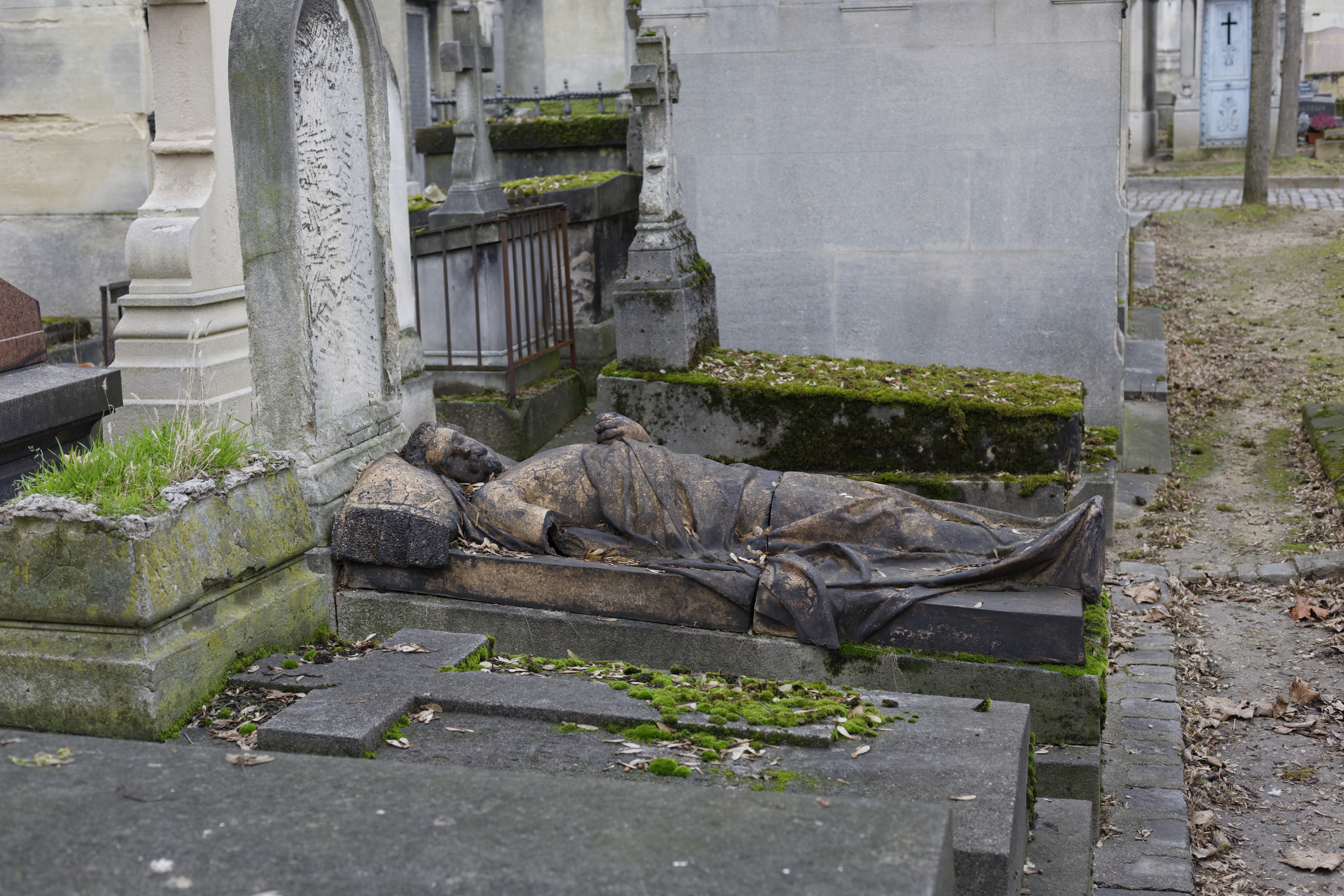 Tombe ornée d'un gisant en terre cuite : « Volpini est représenté couché sur son tombeau ; la tête tournée vers l’épaule droite est posée sur un coussin » (Jouin, 1897).